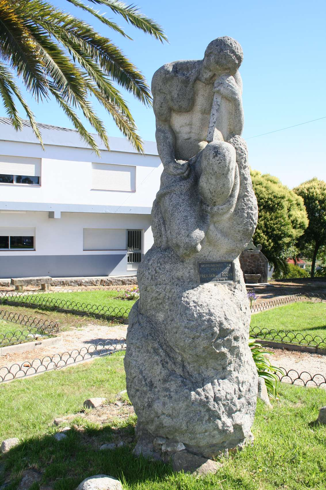 Monumento al poeta Feliciano Rolán de Maxín Picallo en A Guarda, PontevedraGalego: Monumento ó poeta Feliciano Rolán de Maxín Picallo na Guarda, Pontevedra